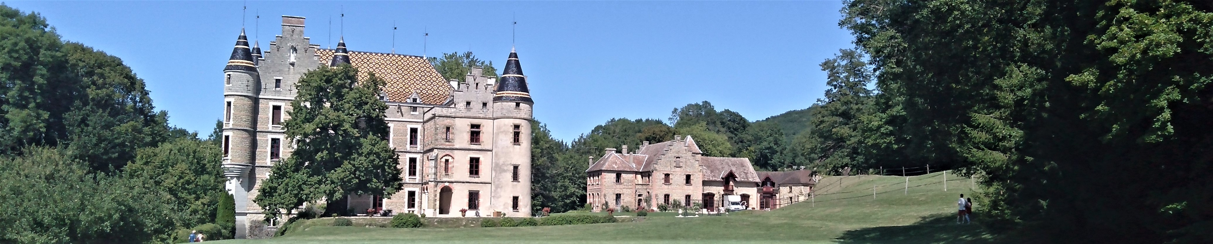 Le château de Pupetières et ses communs (Châbons)